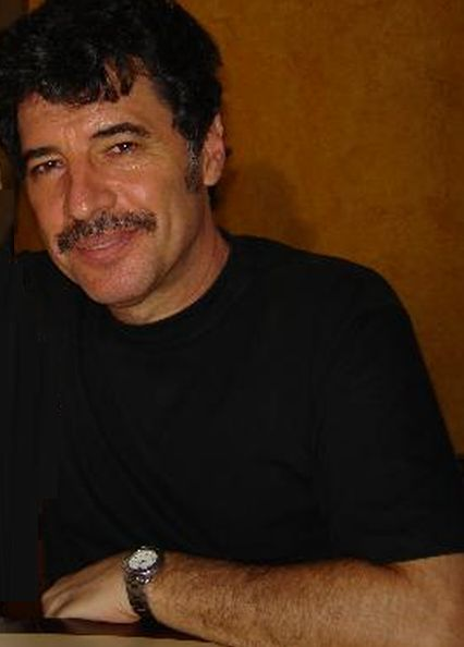 O ator brasileiro Paulo Betti, Campinas, SP